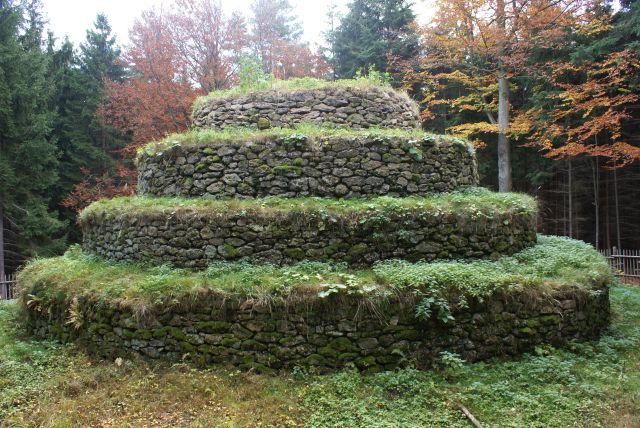 Steinpyramide im Waldviertel bei Ober Neustift (Bezirk Zwettl). Diese Datei wurde unter den Bedingungen der Creative Commons Attribution-ShareAlike License (abgekürzt „cc-by-sa“) in der Version 2.5 veröffentlicht. Creative Commons - Attribution-ShareAlike 2.5